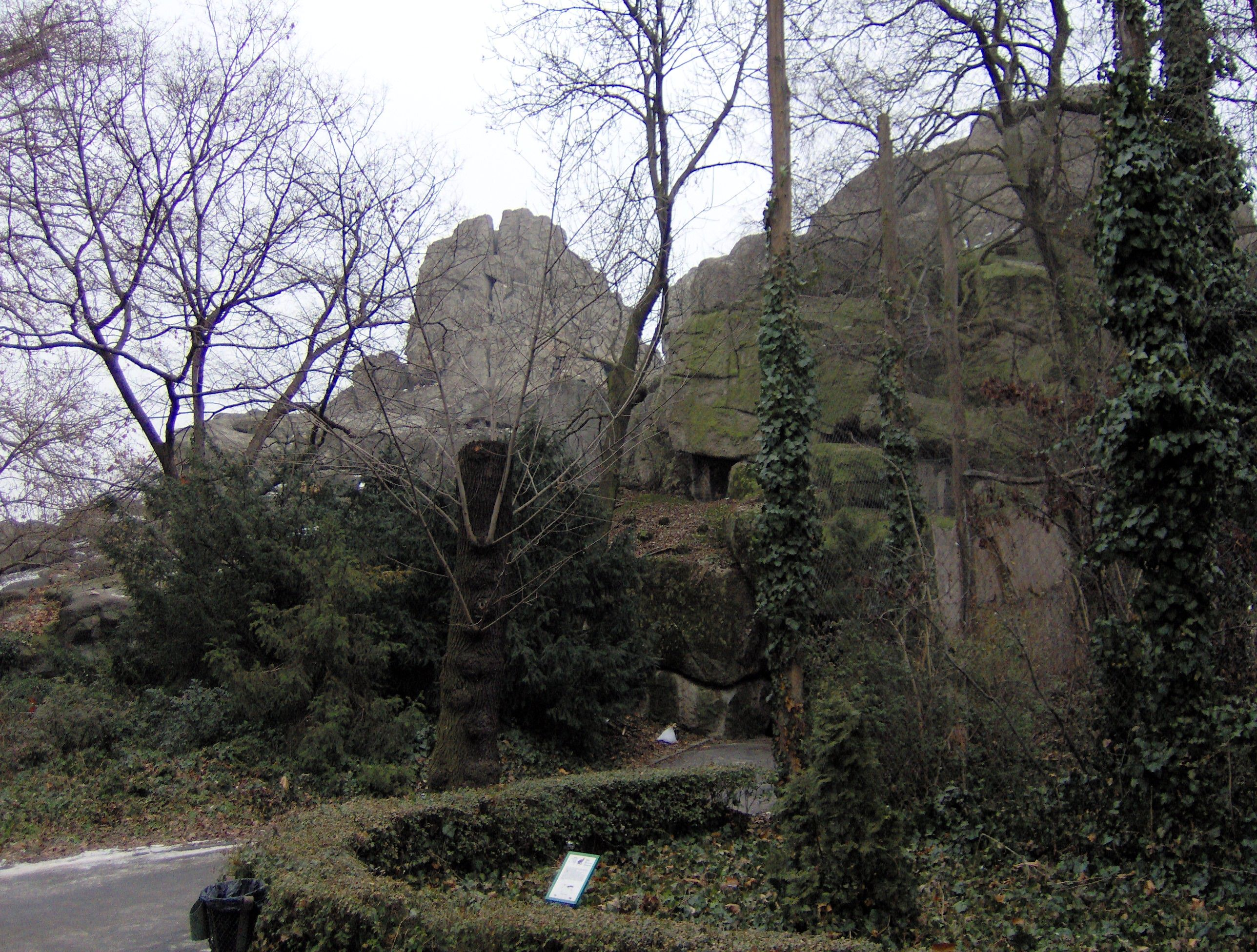 Budapesti állatkert, Nagyszikla